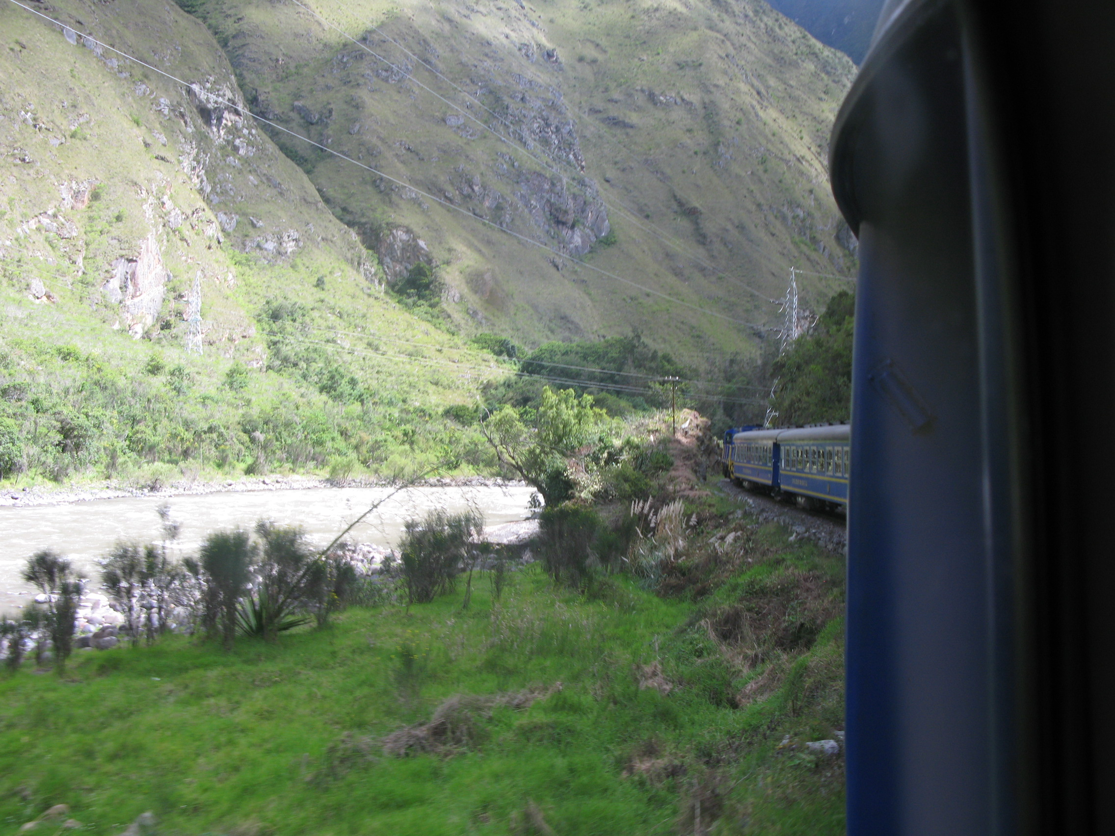 Vlak po dolini reke Urubamba proti Aguas Calientes